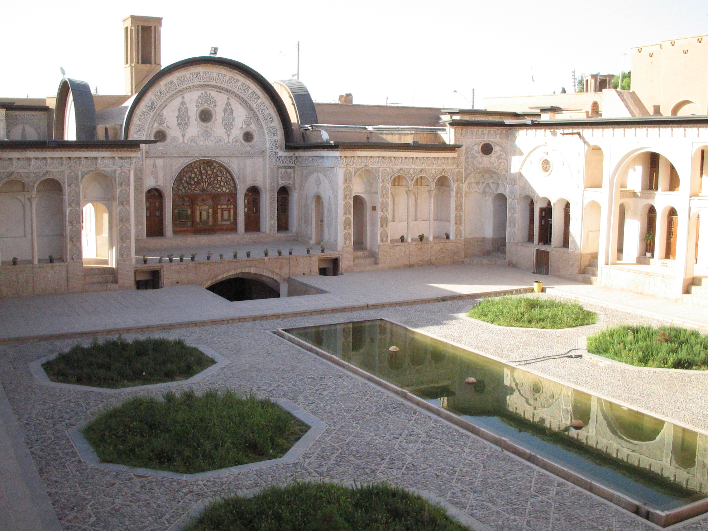 Khaneh Tabatabai in Kashan, Iran.